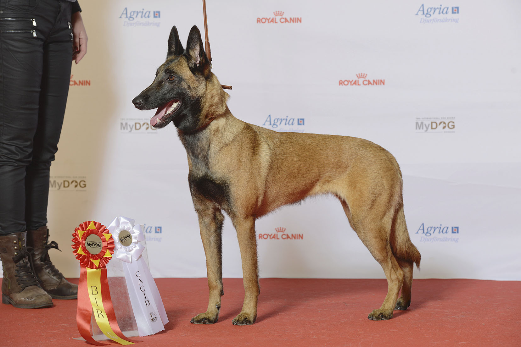 Grupp 1, BELGISK VALLHUND, MALINOIS, Krokasmedens Epic MyDOG, nordens största hundevenemang.